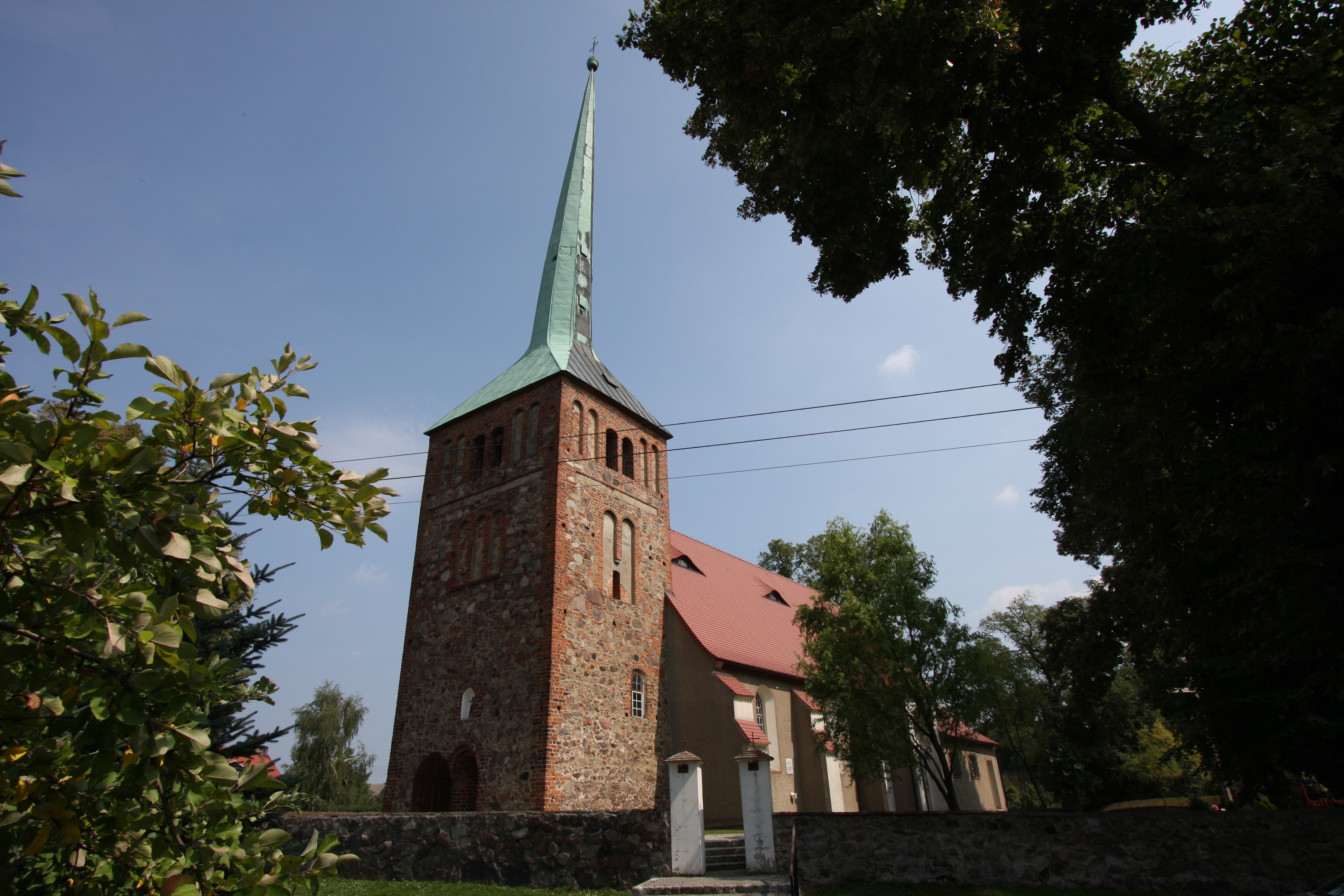 Chociszewo, kościół par. p.w. Narodzenia św. Jana Chrzciciela, mur., XV, XX